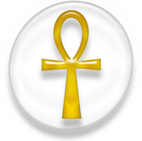 Symbol of Kemetism, golden version.